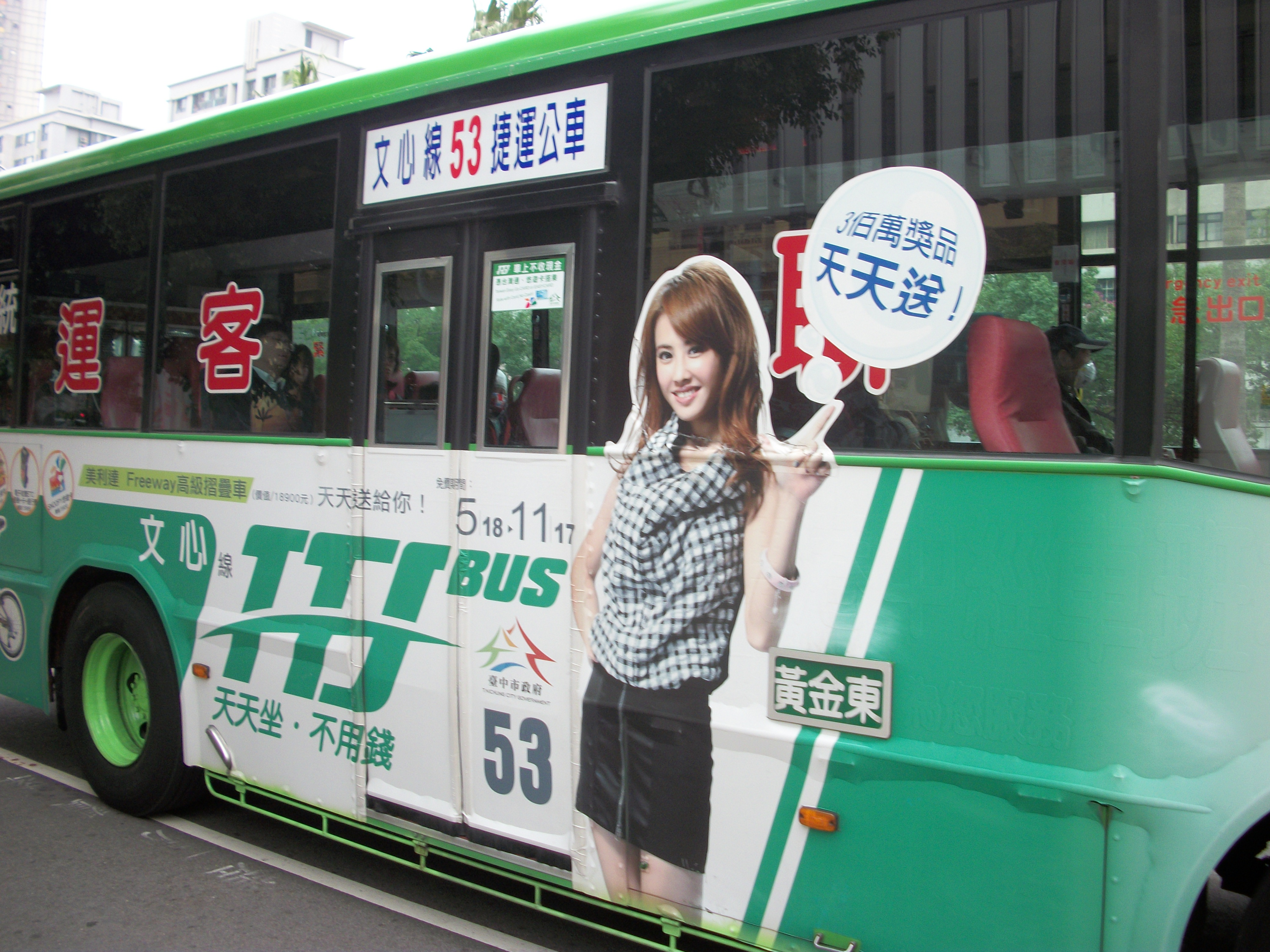 統聯客運大客車行駛臺中市TTJ捷運公車文心線。